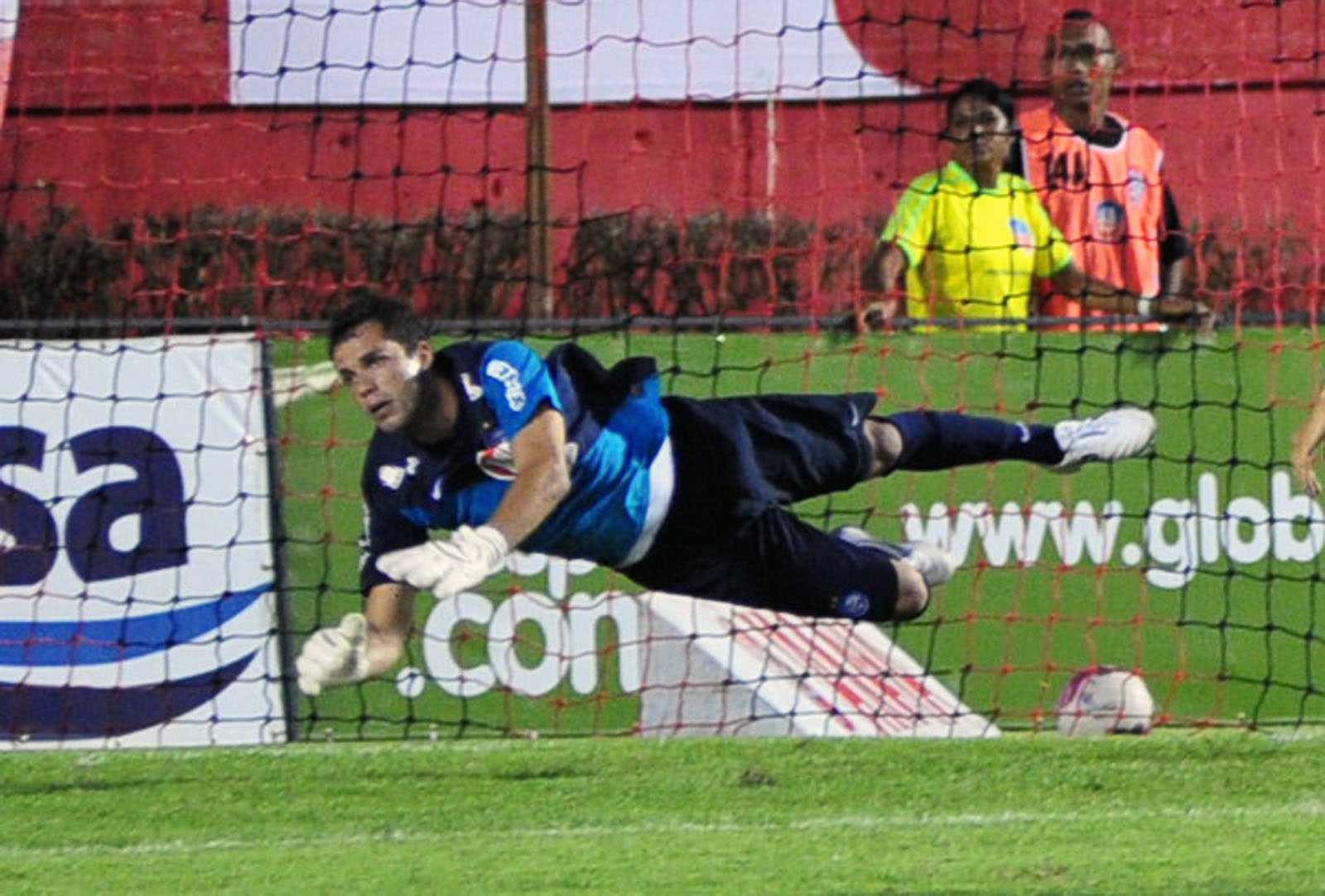 Lomba em ação pelo Bahia em 2012